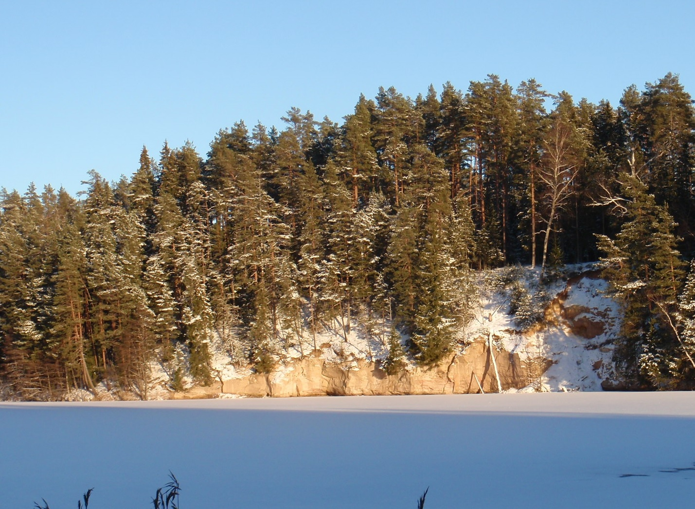 Laaritsamägi Ahja jõel